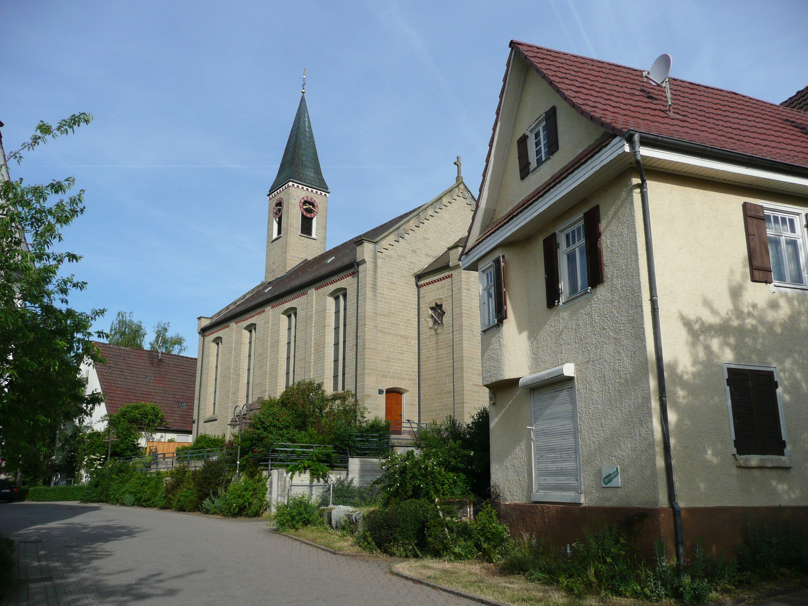 Bricciuskirche von 1858 in Oberjesingen